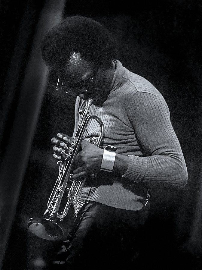 Miles Davis Septet Sigma 7